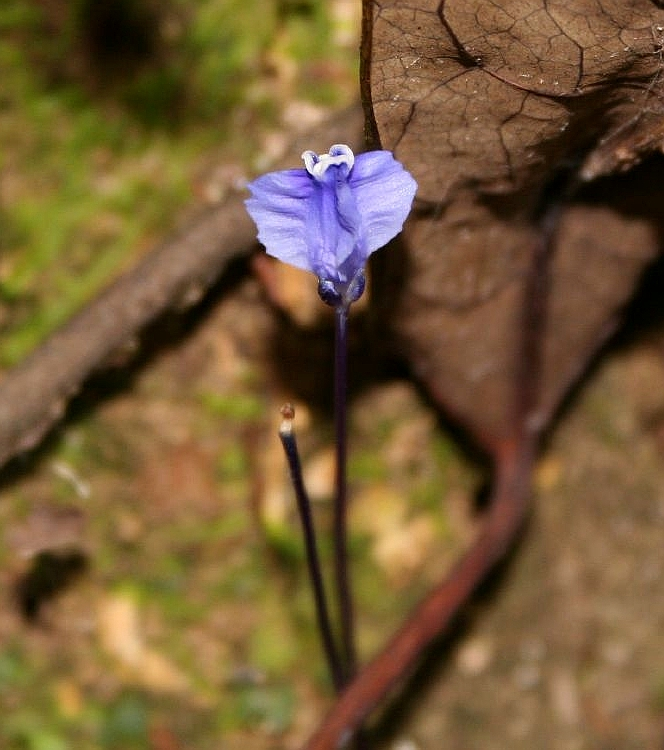 Burmannia itoana at Taipokau Nature Reserve, Hongkong